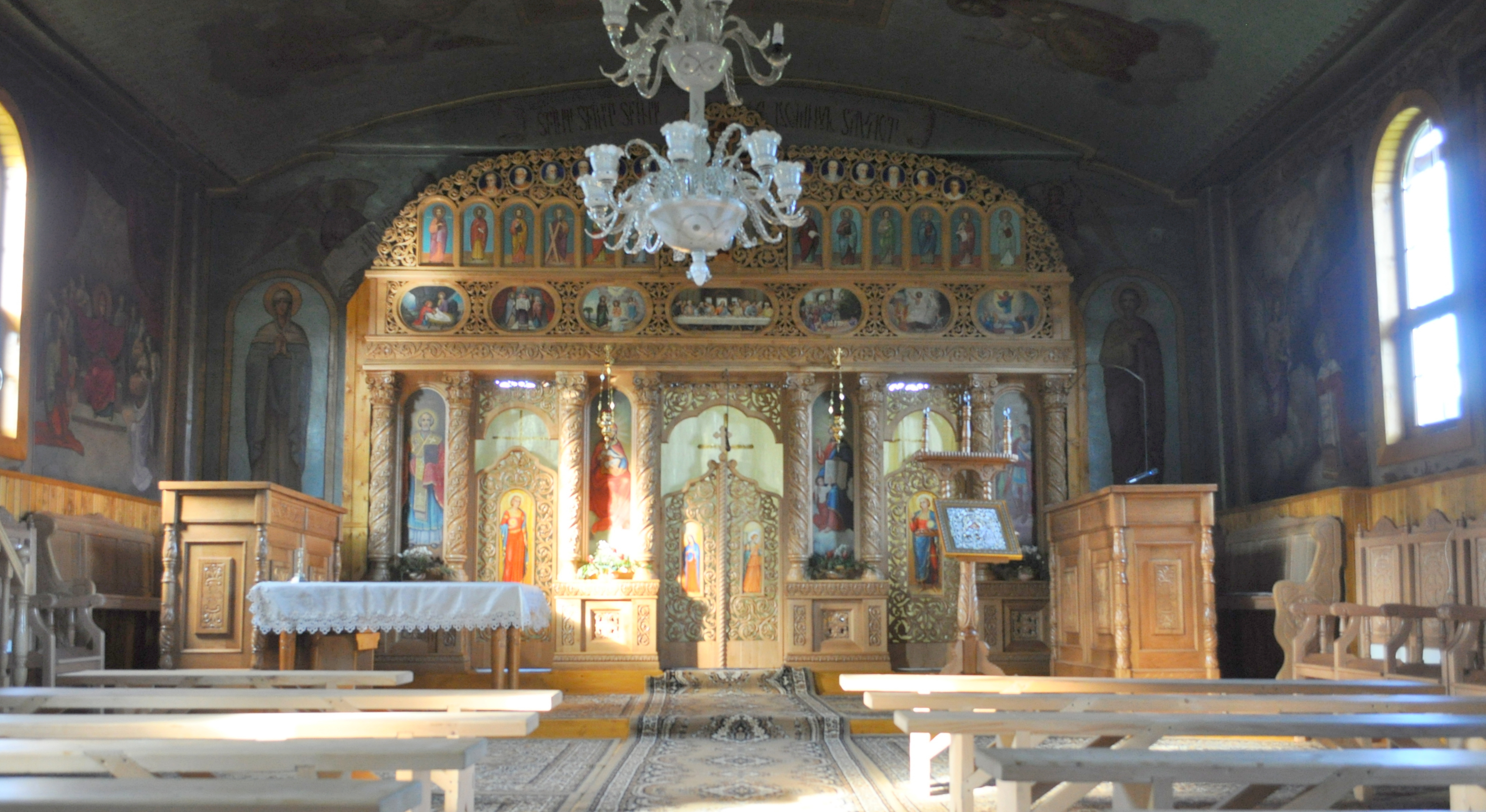 Răchițele, județul Cluj